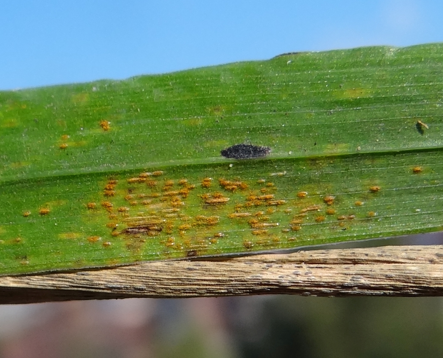 Pustules Puccinia coronata on leaf Poaceae. Location: Poland, Trzciana, województwo małopolskie